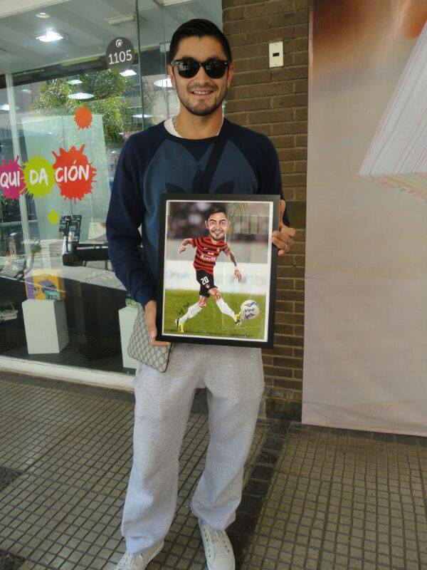 mall paseo quilin